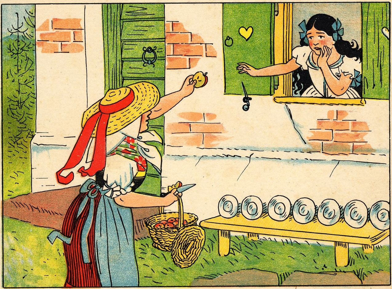 Schneewittchen. Ein Märchen in zwölf Bildern von Lothar Meggendorfer. Stuttgart: Weise.